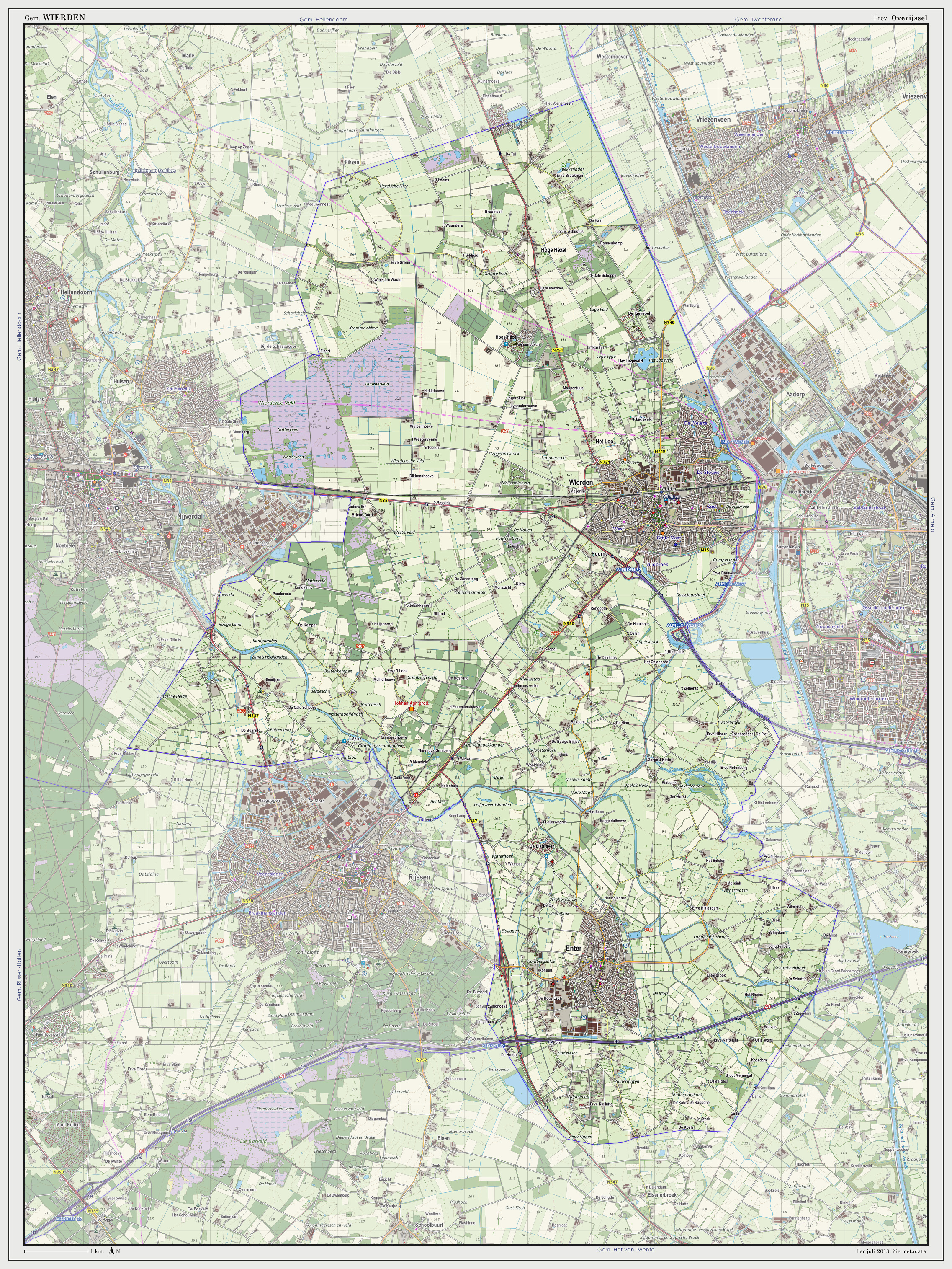 Topografische kaart van gemeente Wierden (2013). Samengesteld door Jan-Willem van Aalst op basis van de GML open geodata van de BRT/Top10NL (basisregistratie Topografie, Kadaster 2011), vrijgegeven door Kadaster onder de Creative Commons BY licentie. Additionele gegevens uit BAG (8 juli 2013), uit de Open Street Map (9 juli 2013) en uit de Risicokaart. Peildatum kaartbeeld: 9 juli 2013. Zie ook Gemeentenatlas.nl Samenstelling en kleurenschema: Jan-Willem van Aalst, met QuantumGIS en Photoshop. Zie ook de Legenda.